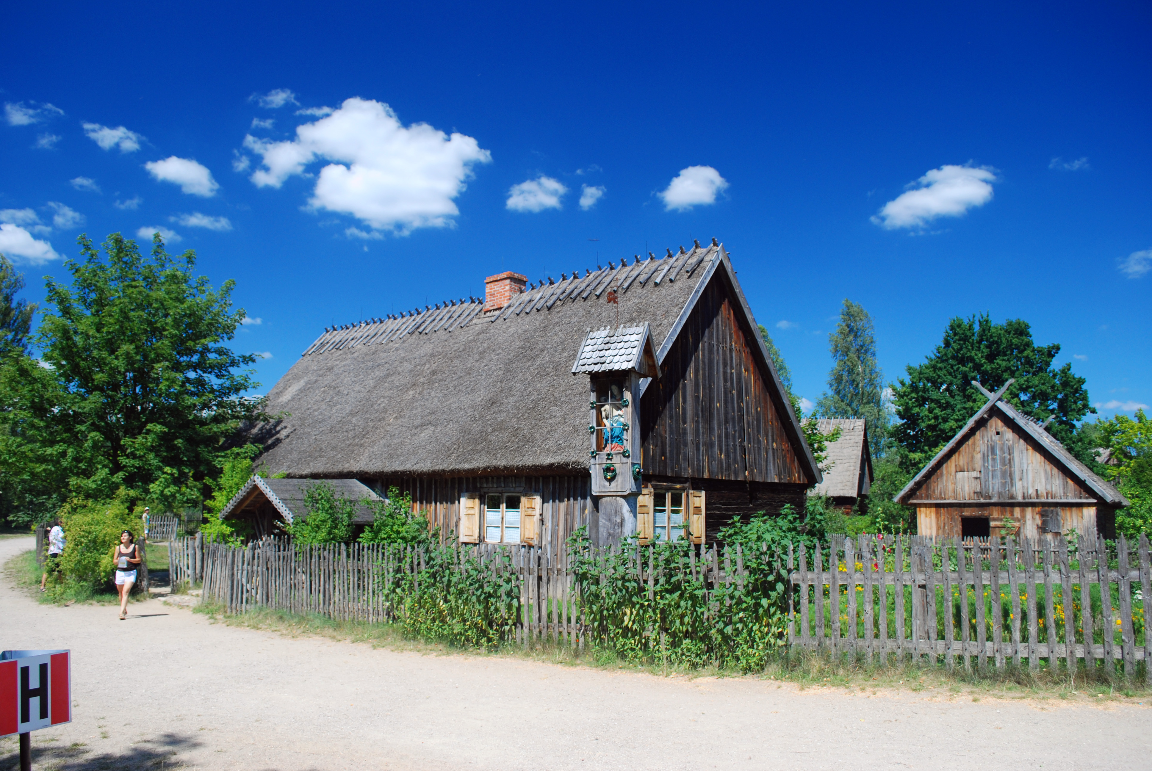 Kaszubski Park Etnograficzny we Wdzydzach Kiszewskich - zagroda drobnoszlachecka przeniesiona z Trzebunia, druga połowa XIX w.